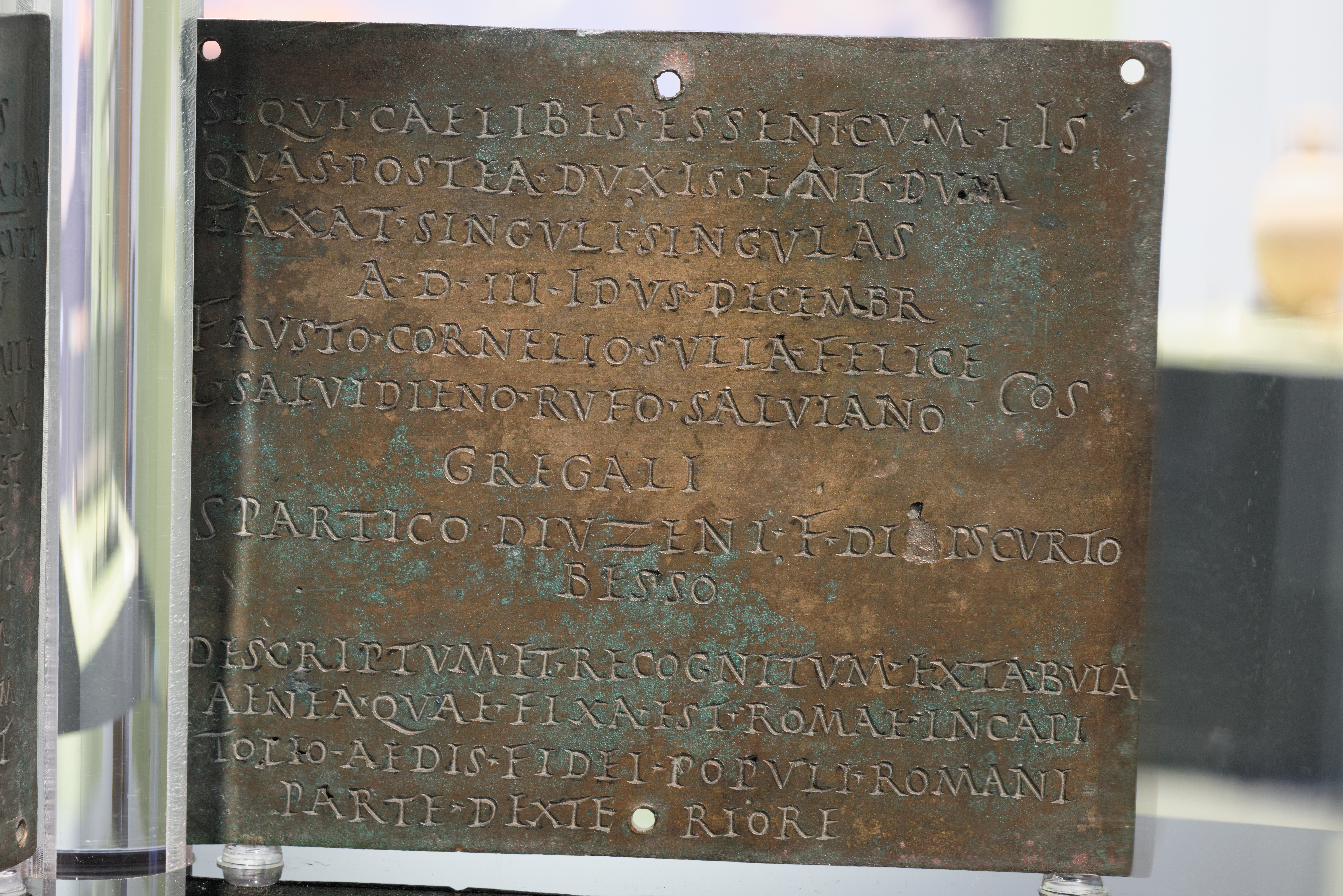 Diplôme militaire (honesta missio) 49 ap. J.-C. Découvert à Stabies entre 1749 et 1750 forme de deux tablettes en bronze Hauteur 17,7 cm, largeur 15 cm Naples, Musée Archéologique National, 3706